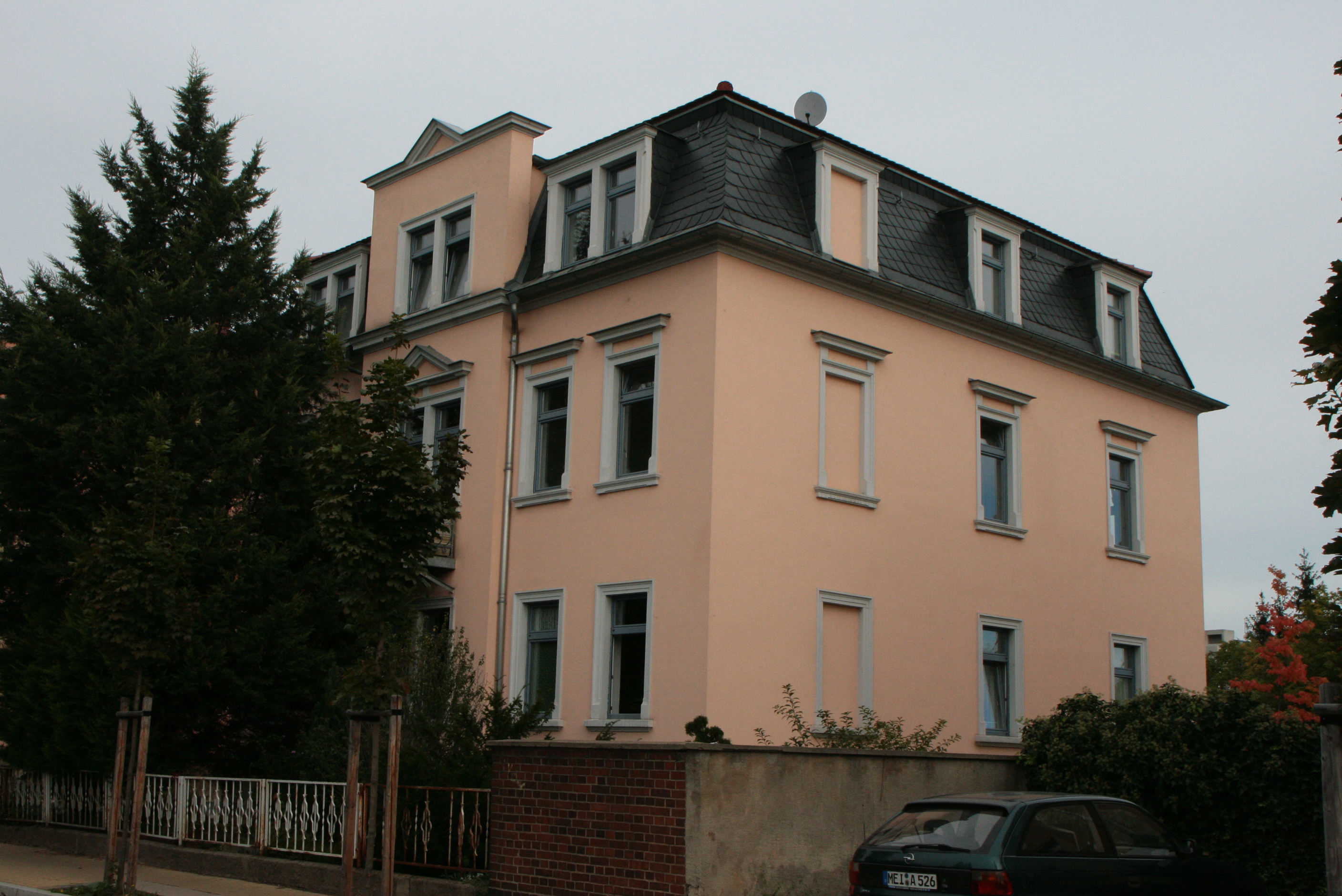 Mietshaus